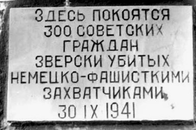 Надпись на памятнике евреям деревни Островно (Бешенковичский район Витебской области), убитым 30 сентября 1941 года. Памятник установлен в 1956 году на месте расстрела. Находится в 2,9 километра от трассы М3, в 900 метрах от указателя границы деревни (в 500 метрах от указателя слева от дороги расположено кладбище, а ещё через 400 метров, тоже слева от дороги, прямо у обочины - памятник).